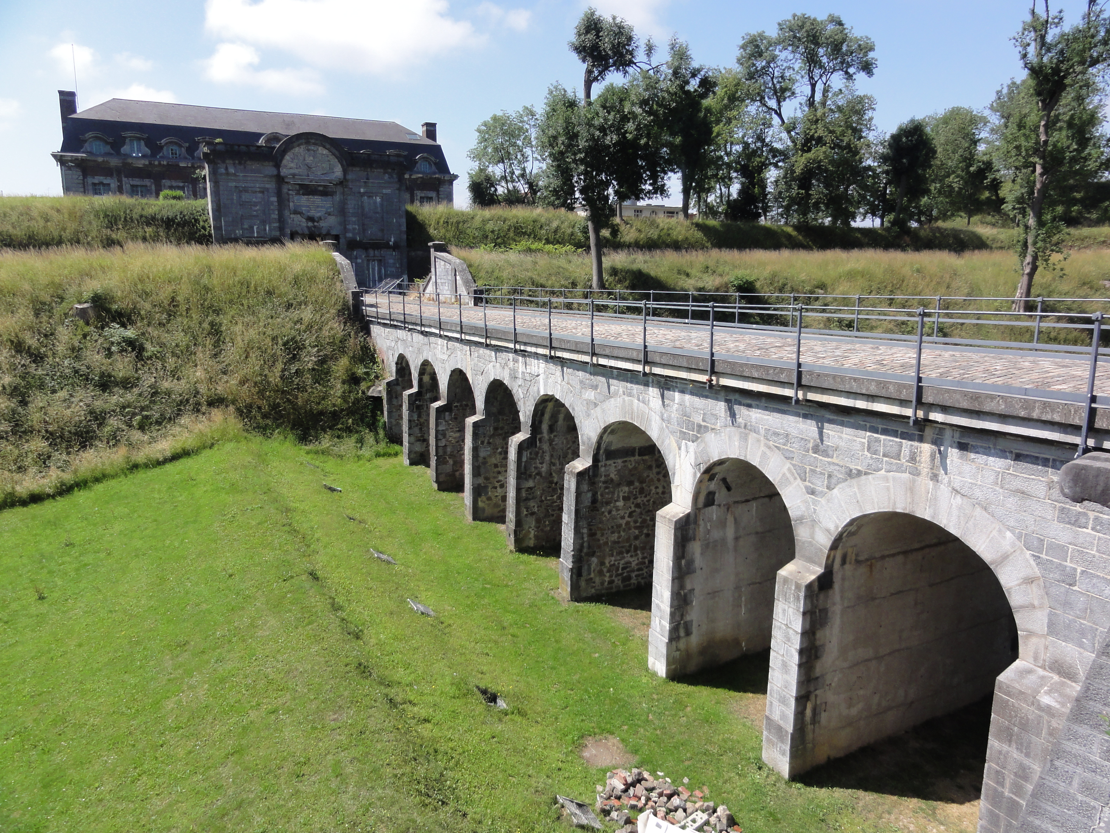 Citadelle de Maubeuge (Nord, Fr)